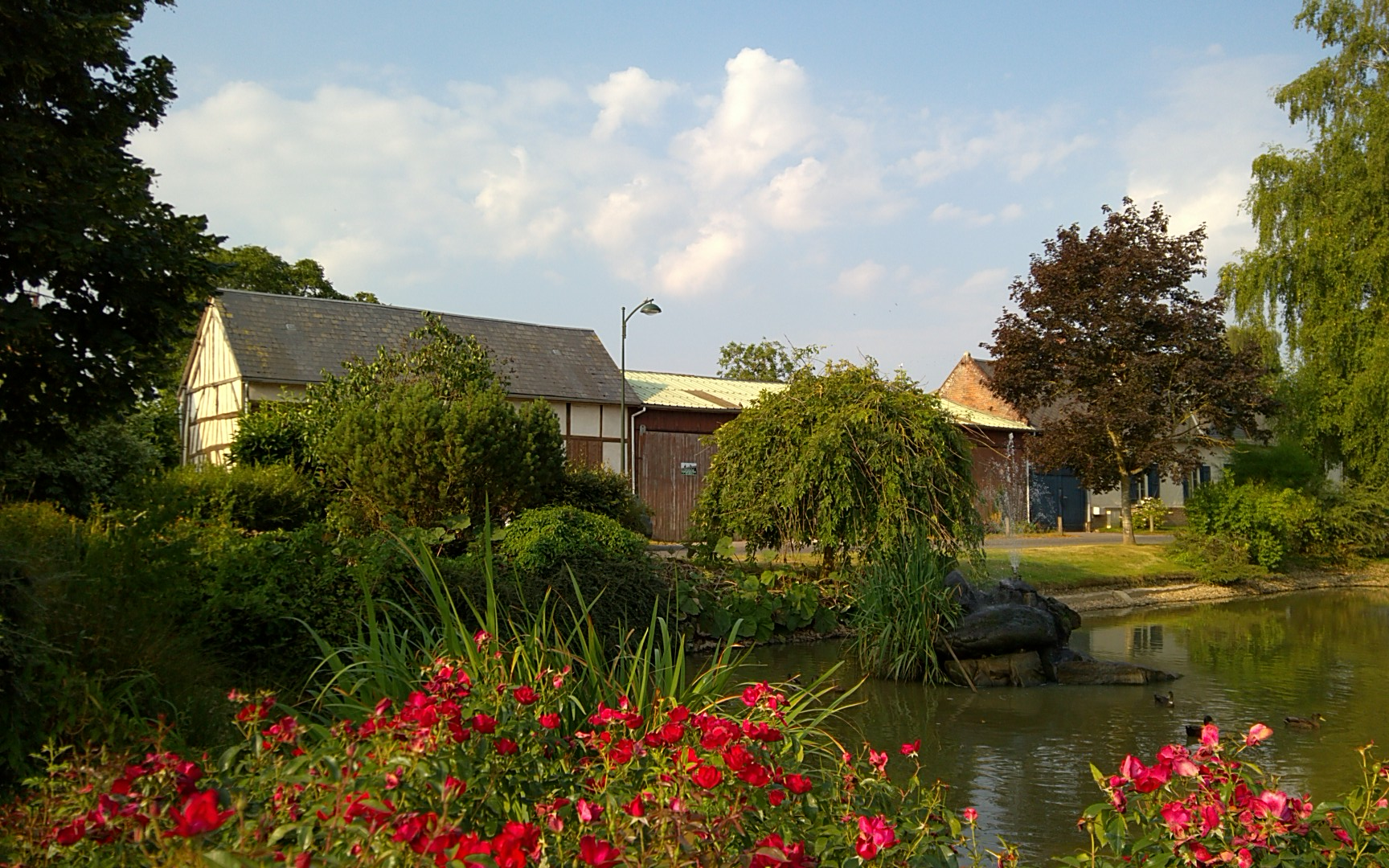 Sarnois (Oise) : Vue panoramique sur la mare